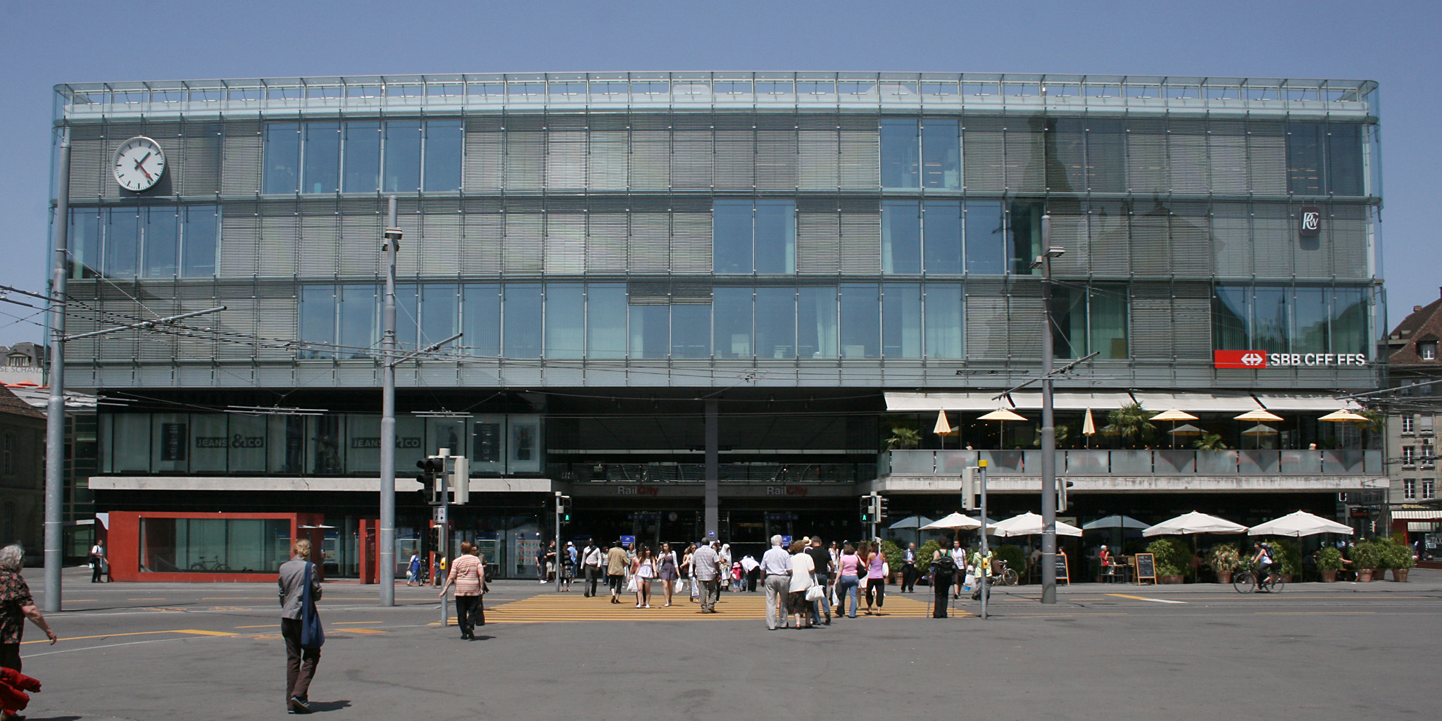 Hauptbahnhof Bern, Schweiz